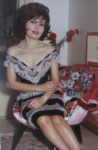 ایرن در جوانی